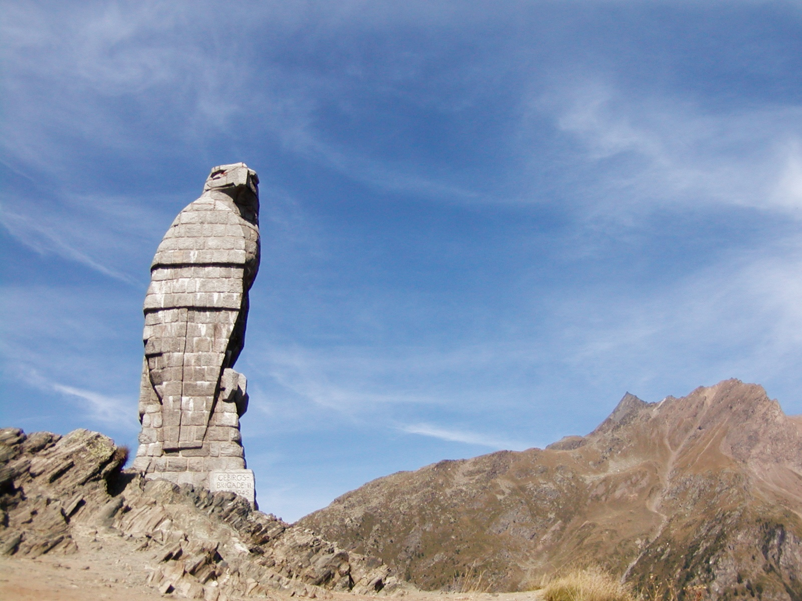 L'aigle en pierre, monument commémoratif érigé au col du Simplon (Valais - Suisse) sur mandat de la Brigade de montagne 11 par l’artiste Baumann de Faulensee